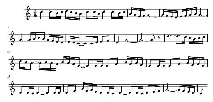 Thème A du Bolero de Maurice Ravel